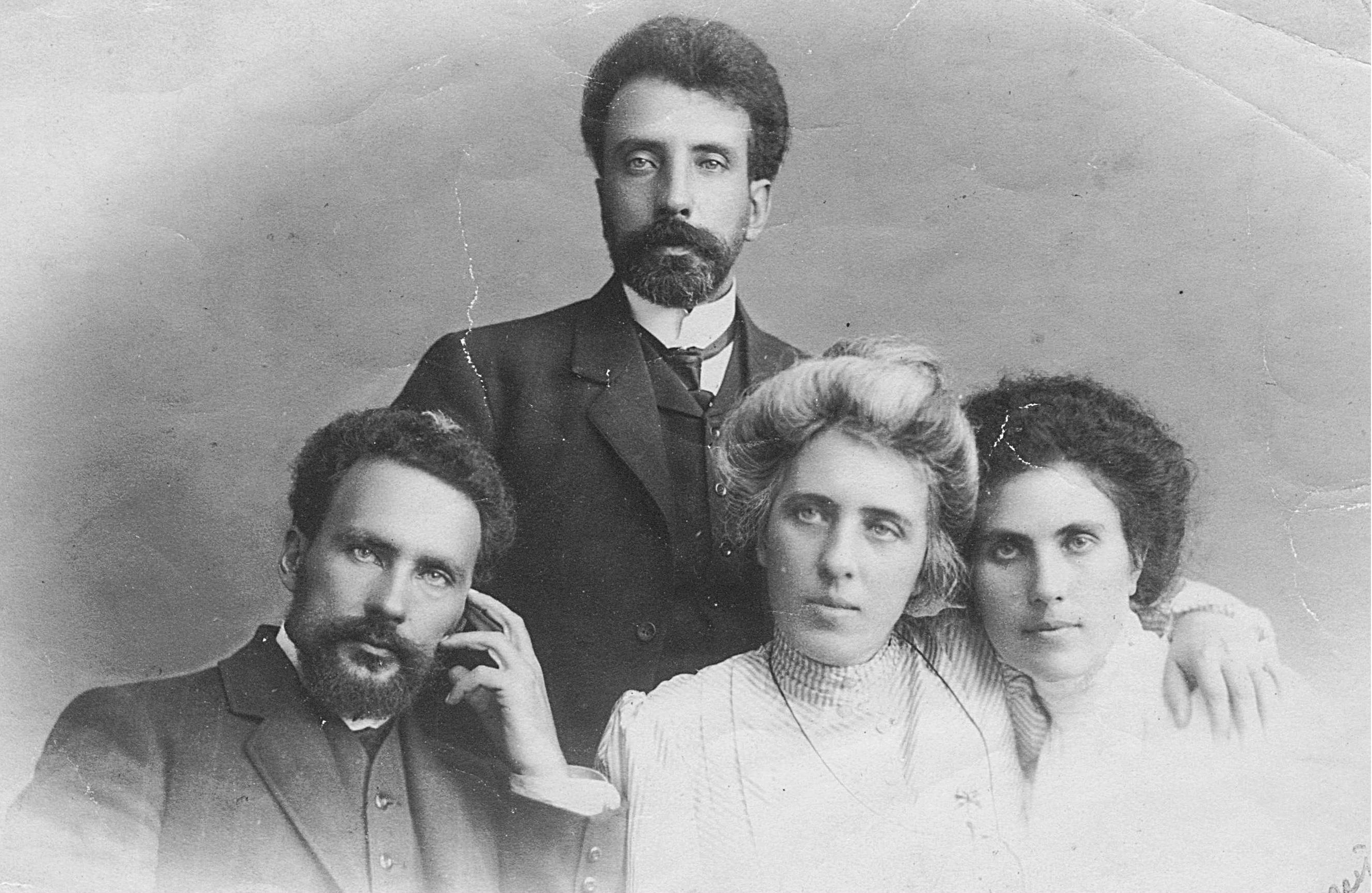 Николай Яковлевич Ляхницкий (1871—?) — присяжный поверенный, член Государственной думы III созыва от Ставропольской губернии с братом Василием и сестрами Софьей и Еленой